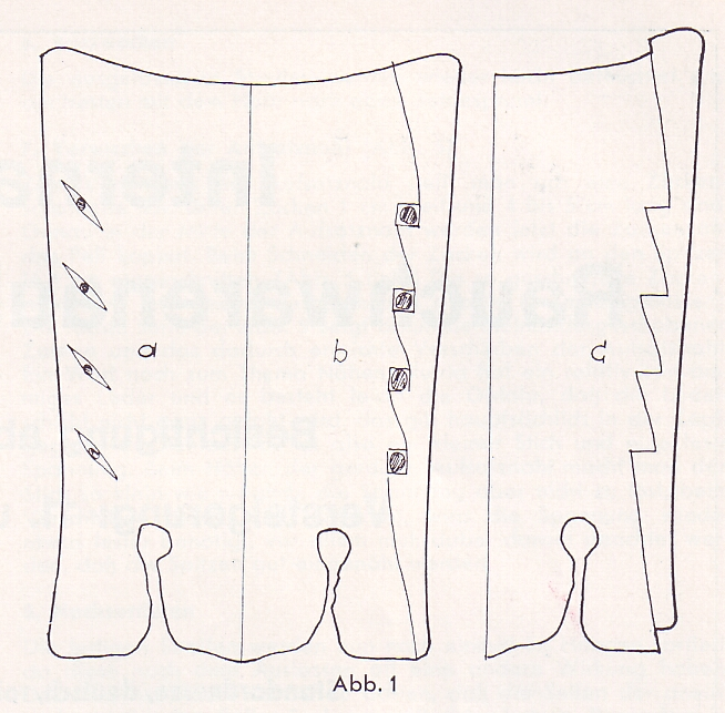 Verarbeitung eines Nutriamantels